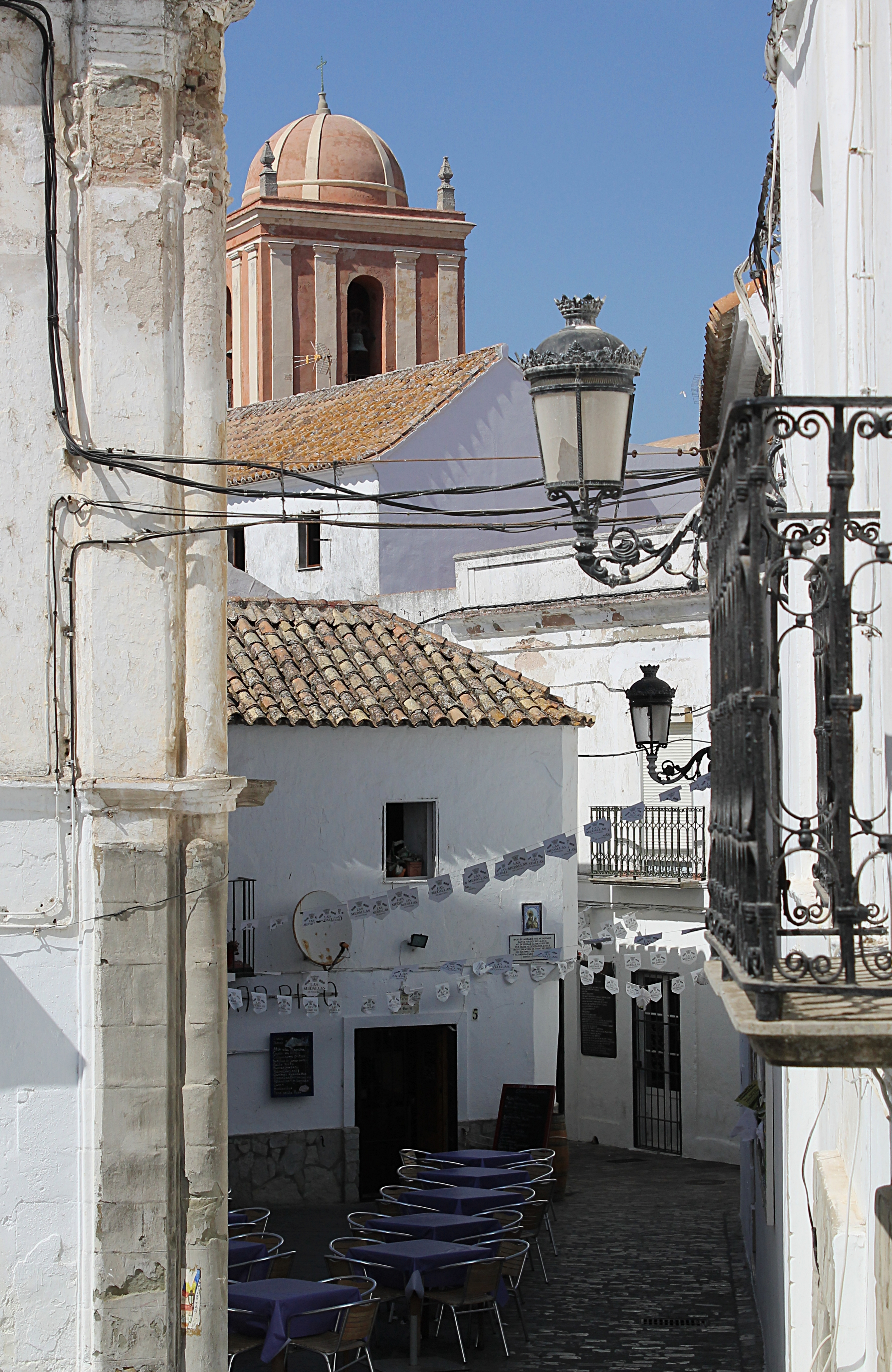 Avec plus de 3000 heures de soleil par an, Tarifa est l'un des endroits les plus ensoleillés de la région.